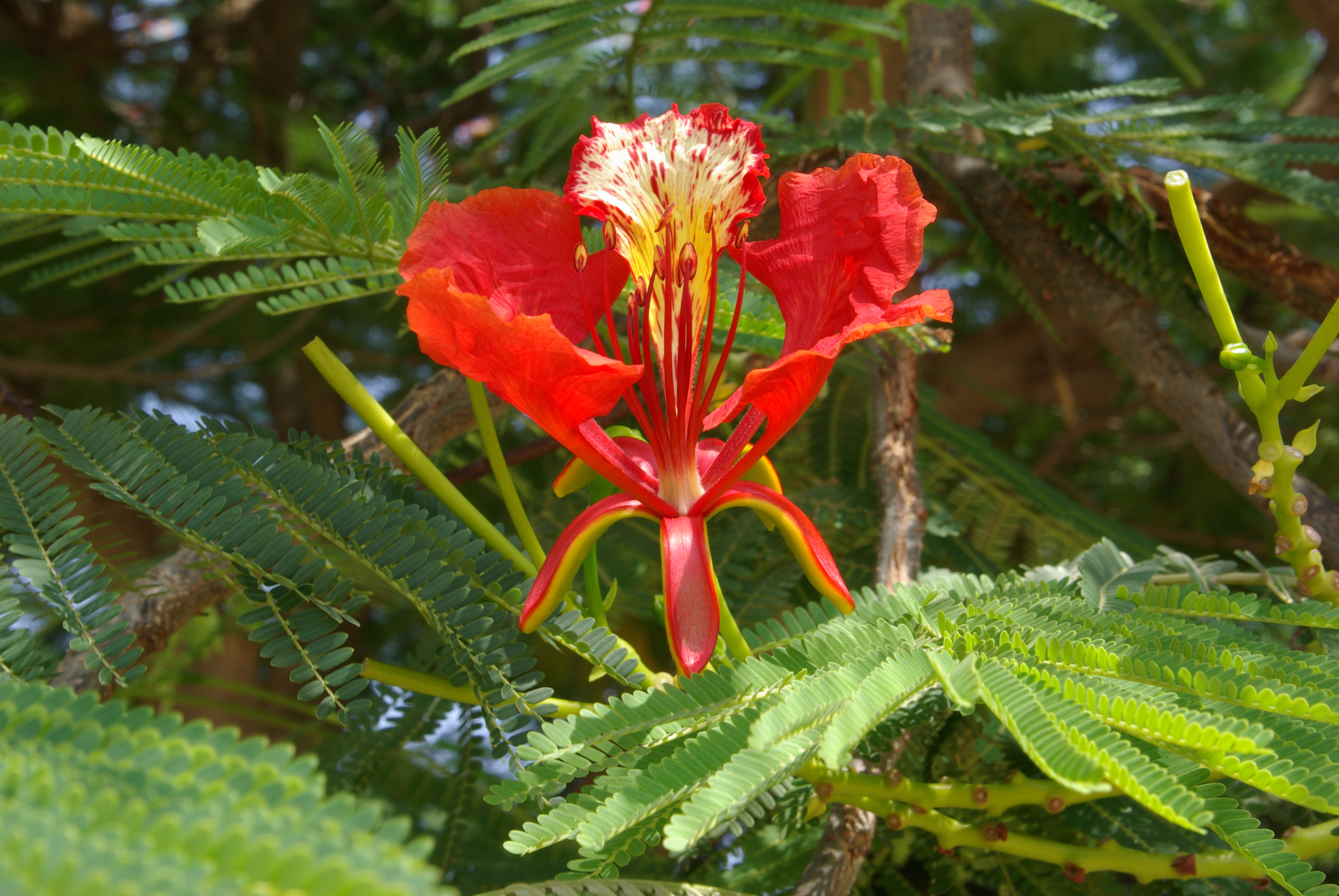 Flammenbaum im Kibbuz Ginnossar in Israel